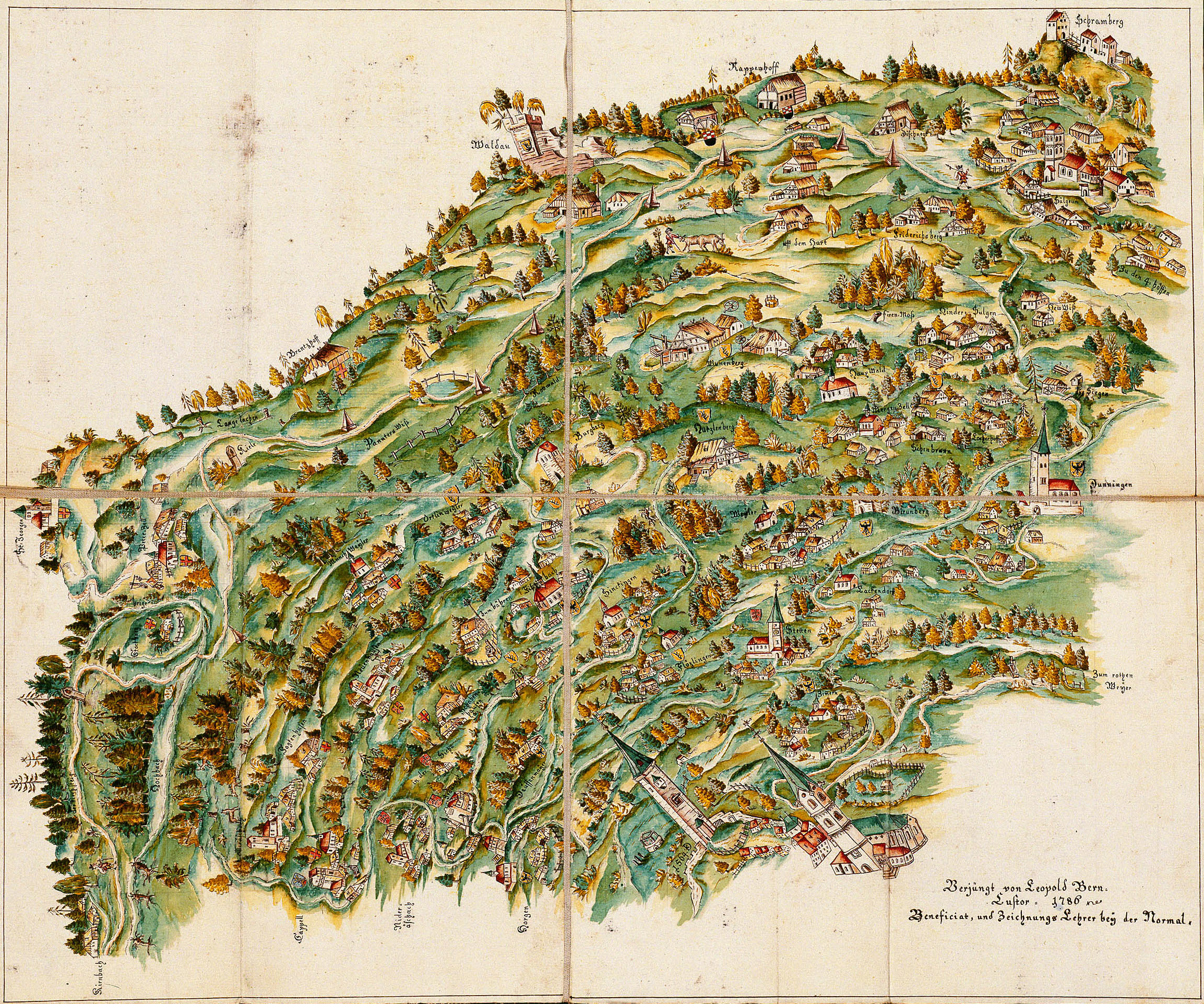 Ausschnitt aus der Pürschgerichtskarte der Reichsstadt Rottweil, kolorierte Nachzeichnung von 1786 (HStAS A 208 B 555)